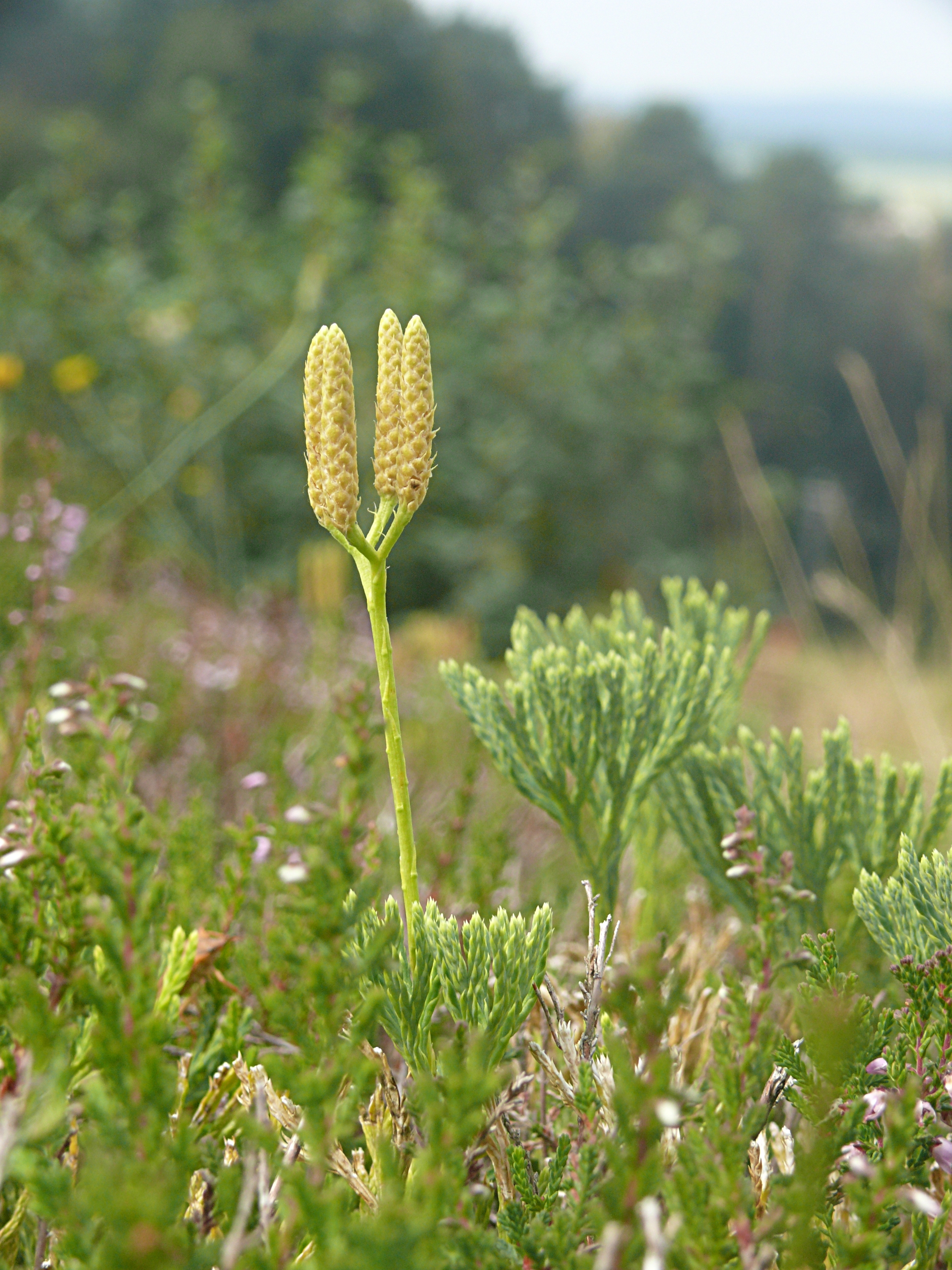 Diphasiastrum tristachyum, Odenwald